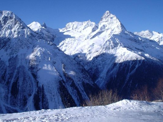 Вершина Белалакая: Западный Кавказ. Домбай. Вершина Белалакая, 3861 м